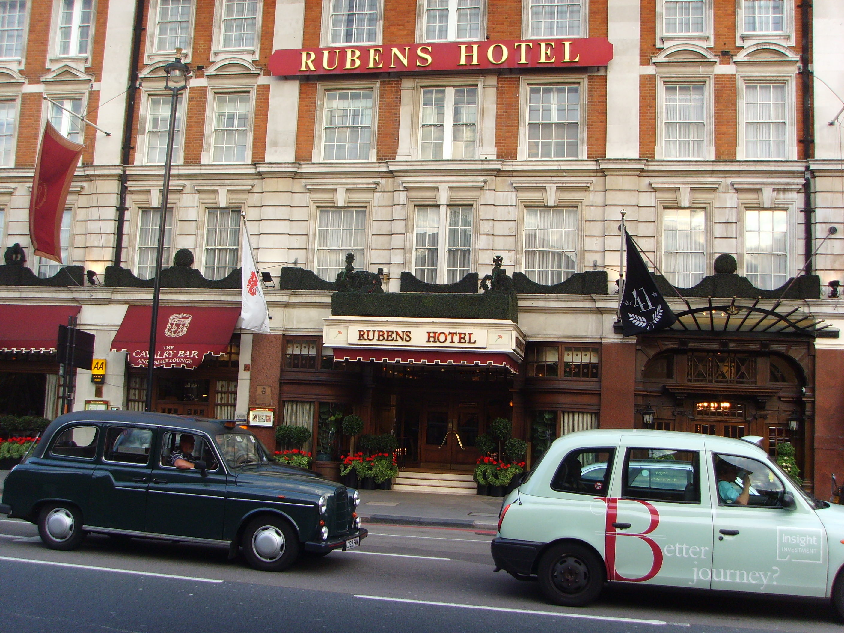 hotel Rubens w Londynie